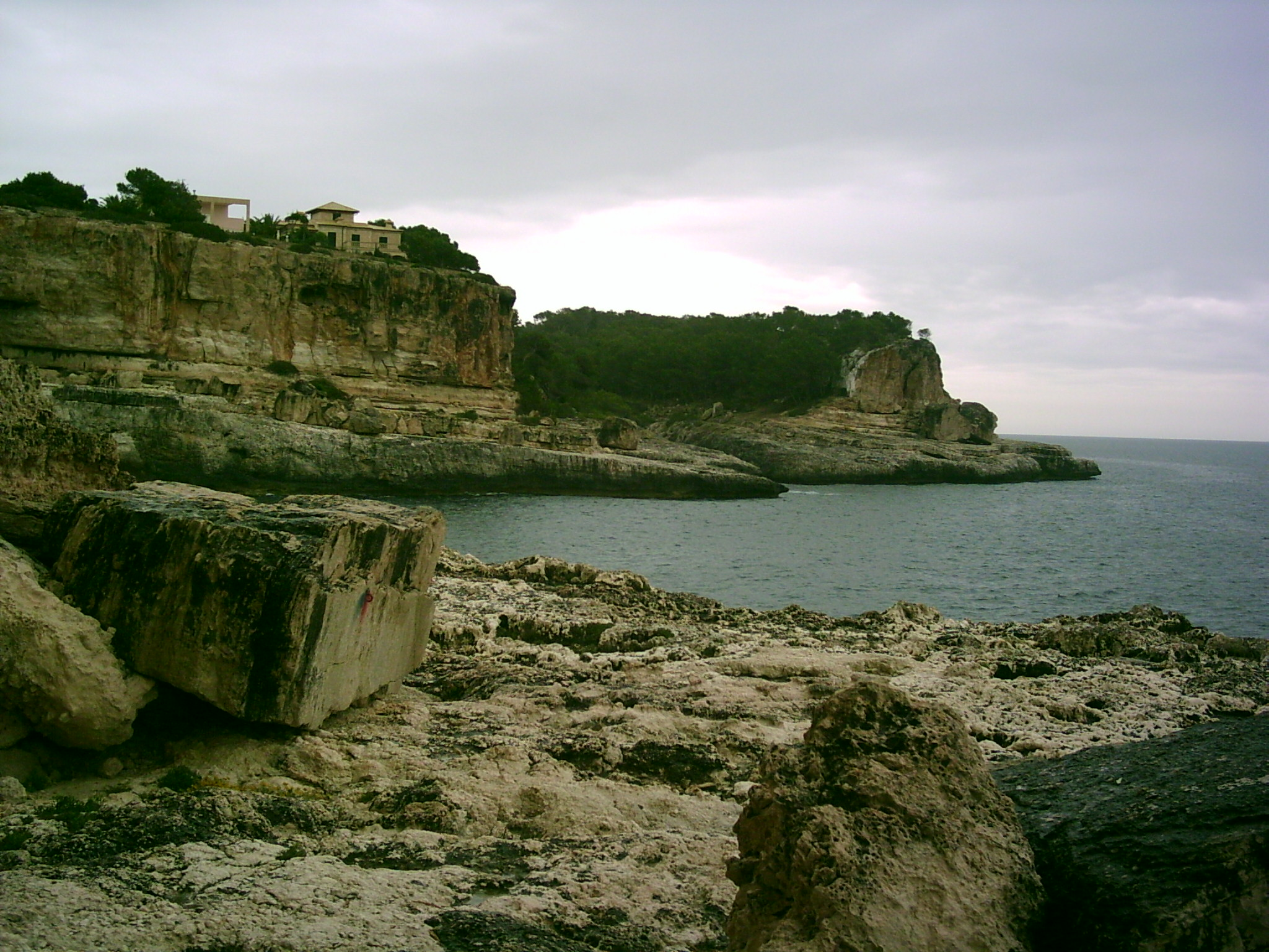 Beschreibung: Bay by Cala Santanyí, Mallorca, Spain Quelle: Fotografiert im März 2006 Fotograf: Alma